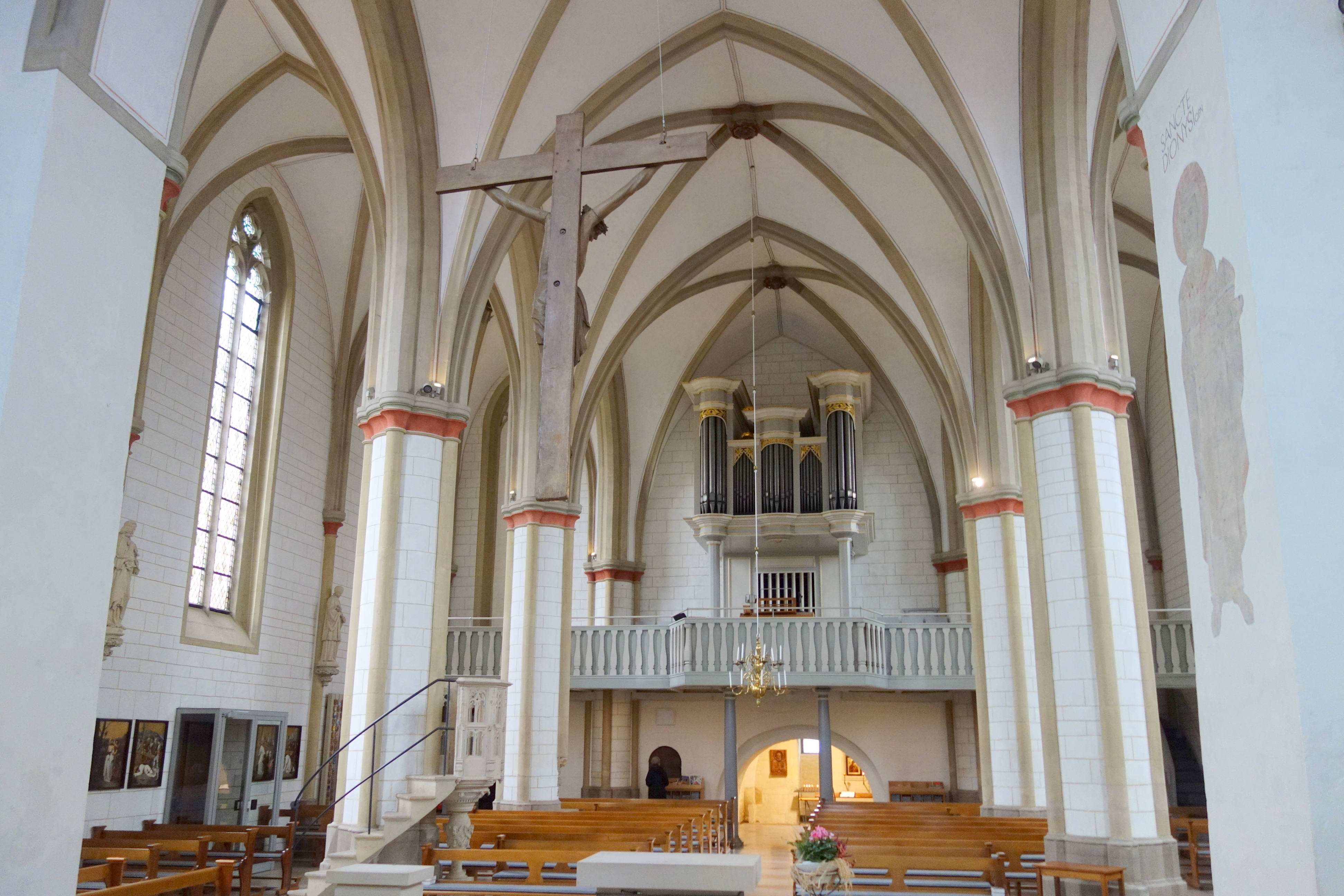 St. Dionysius Havixbeck, Kreis Coesfeld, Nordrhein-Westfalen, Deutschland